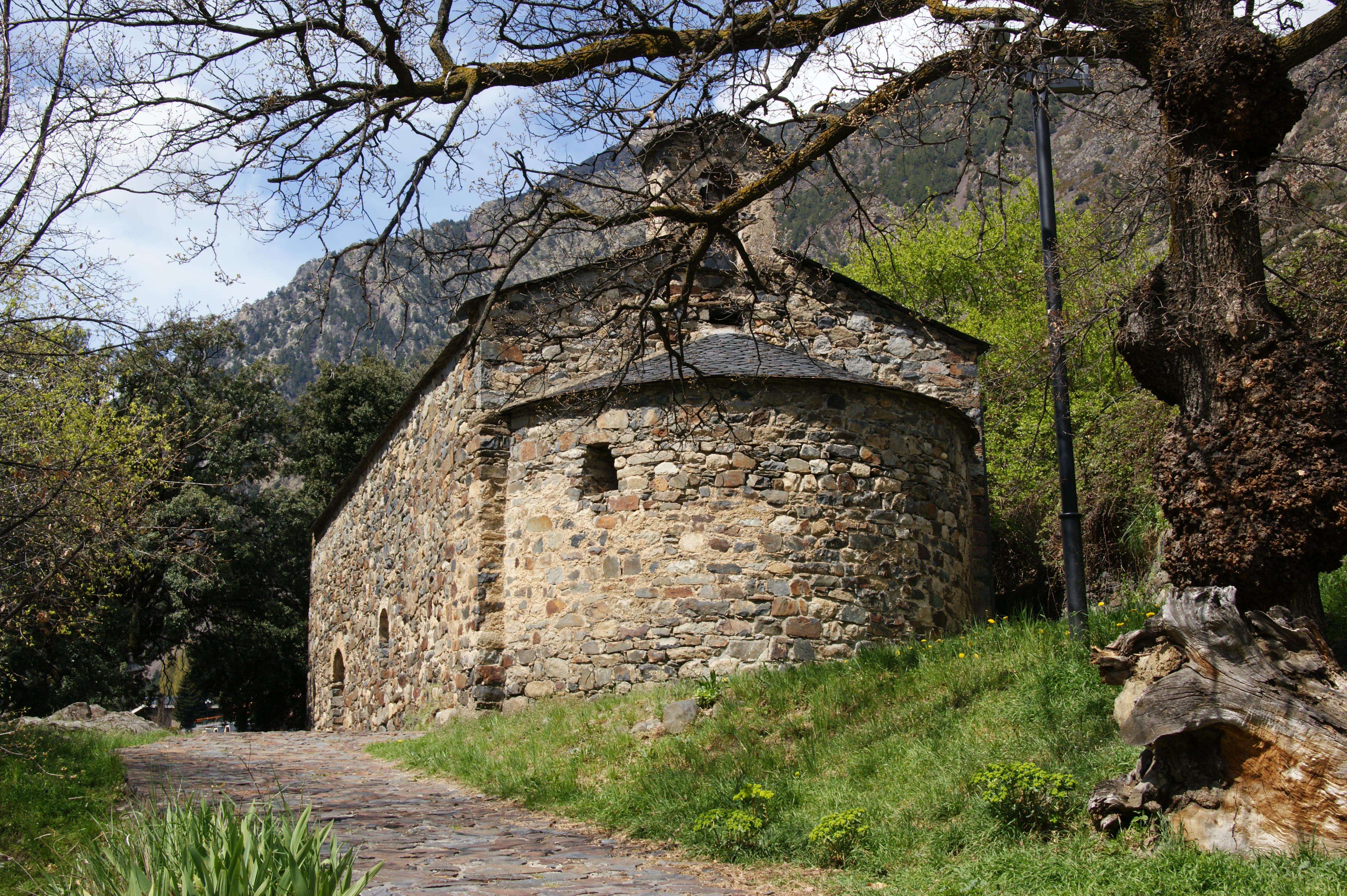 Església de Sant Andreu (Andorra la Vella)